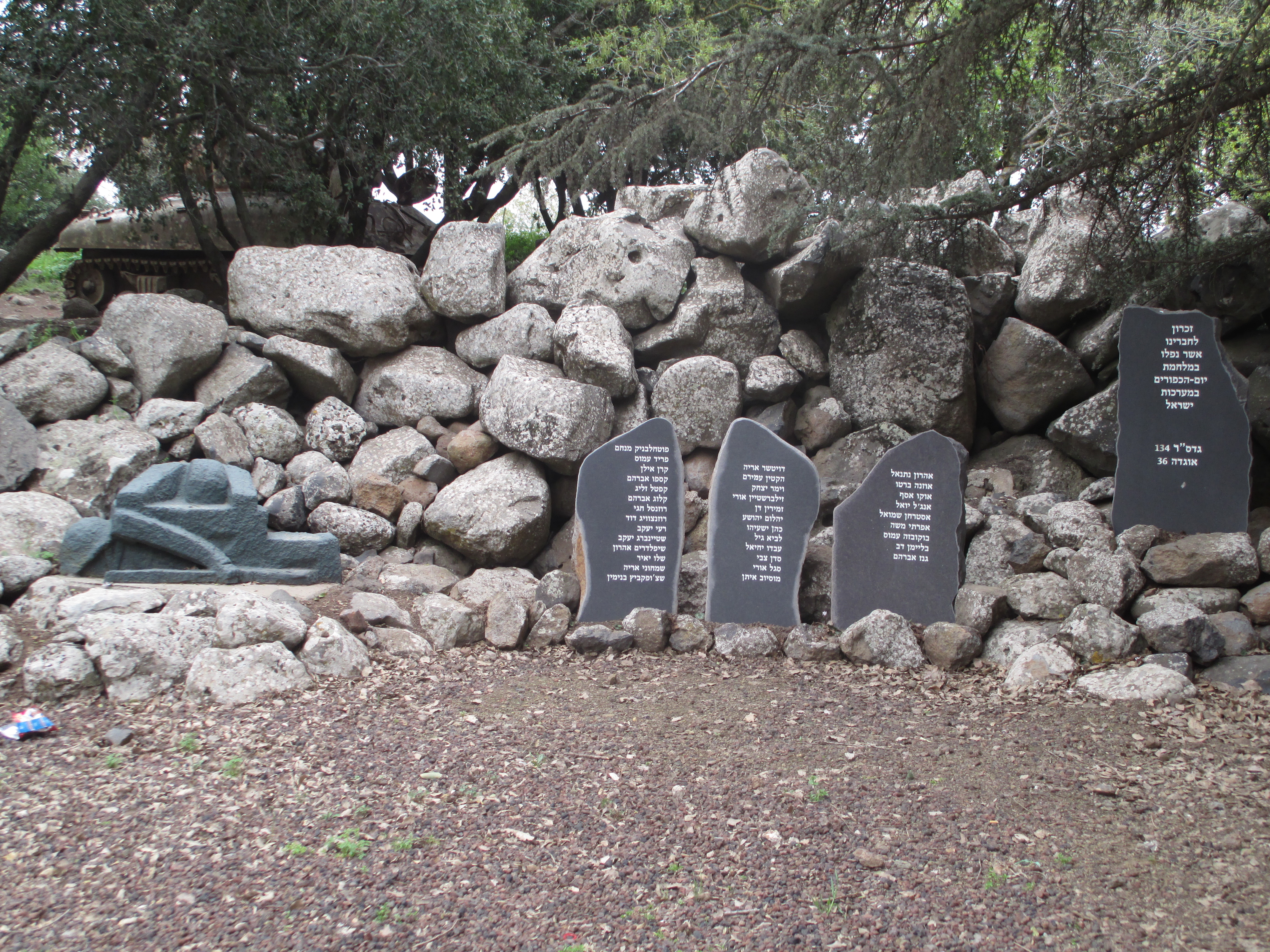 אנדרטת גדס"ר 134 בגולן